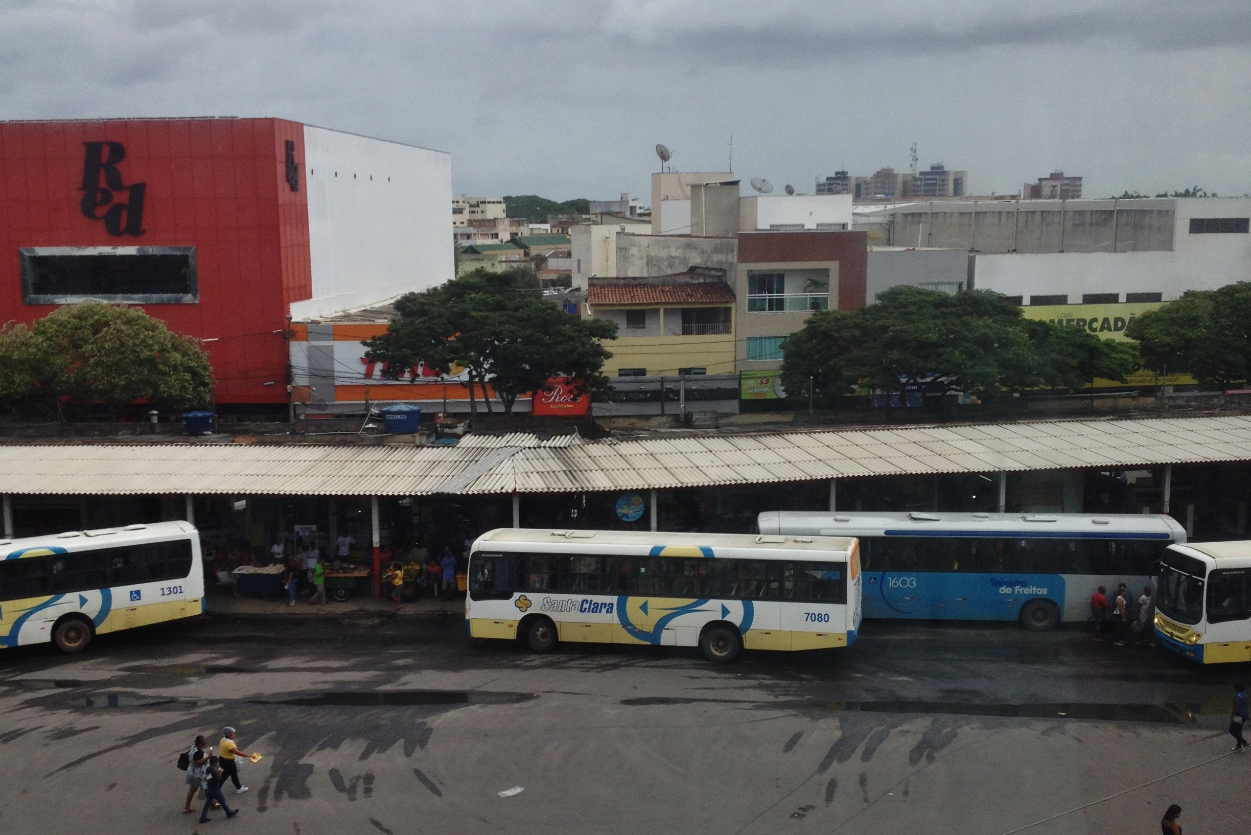 Terminal Urbano de Teixeira de Freitas